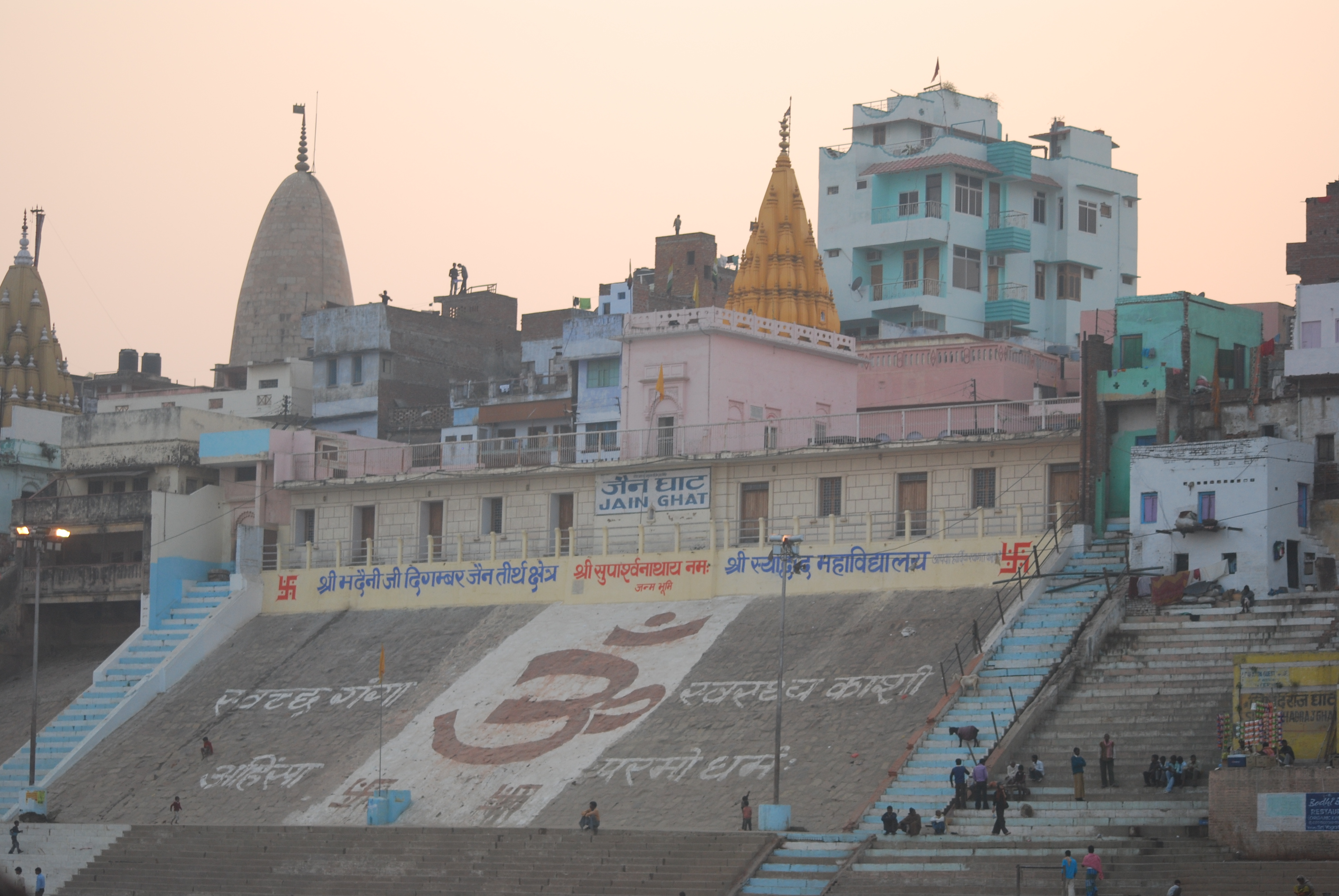 Jain Ghat, Varanasi, UP, India